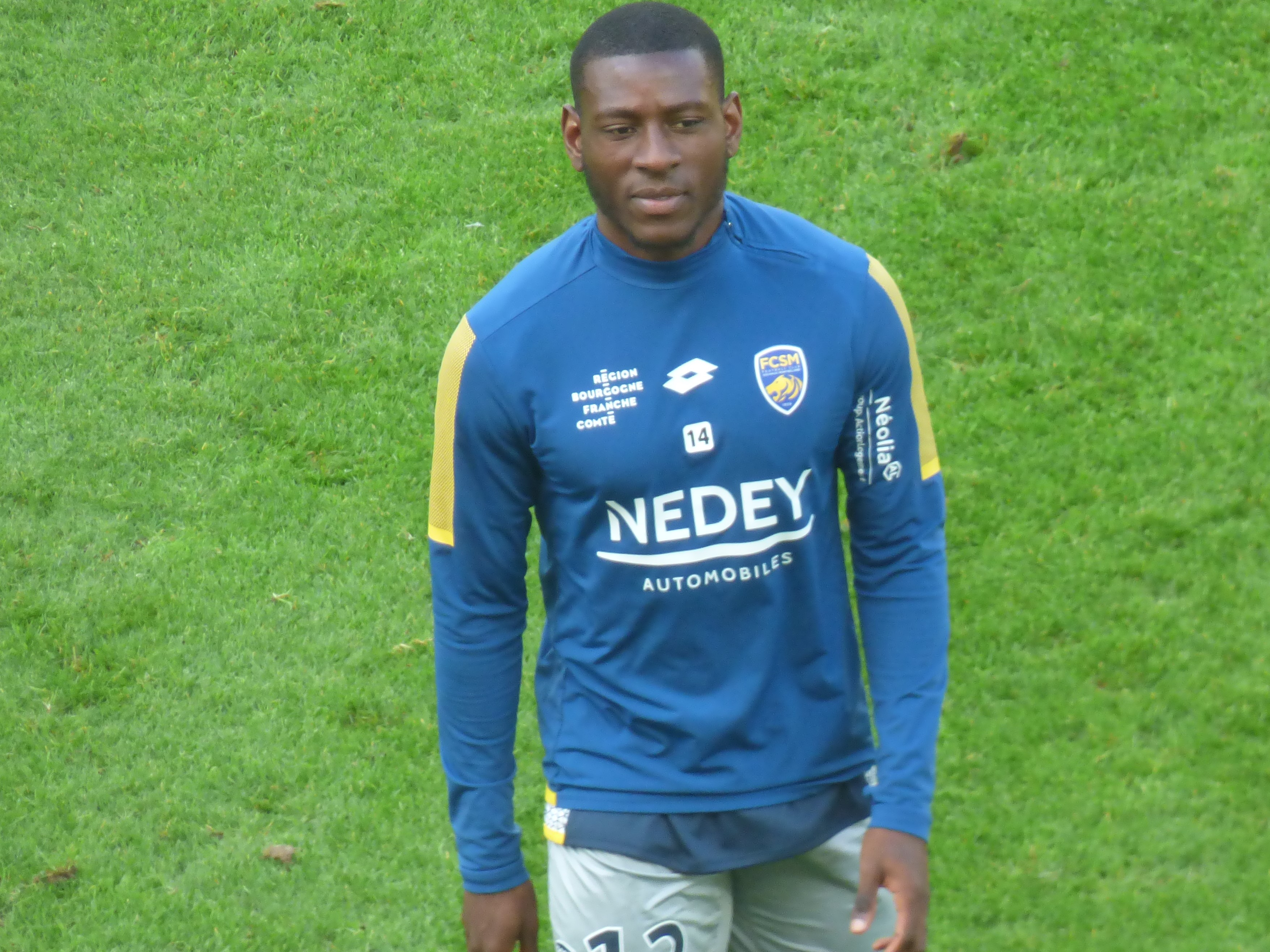 Tope Obadeyi avant le match Lens / Sochaux, comptant pour la septième journée du championnat de France de football de Ligue 2, le 15 septembre 2018.